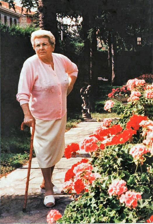 Maria Bigarelli Martinelli, Carpi 1990